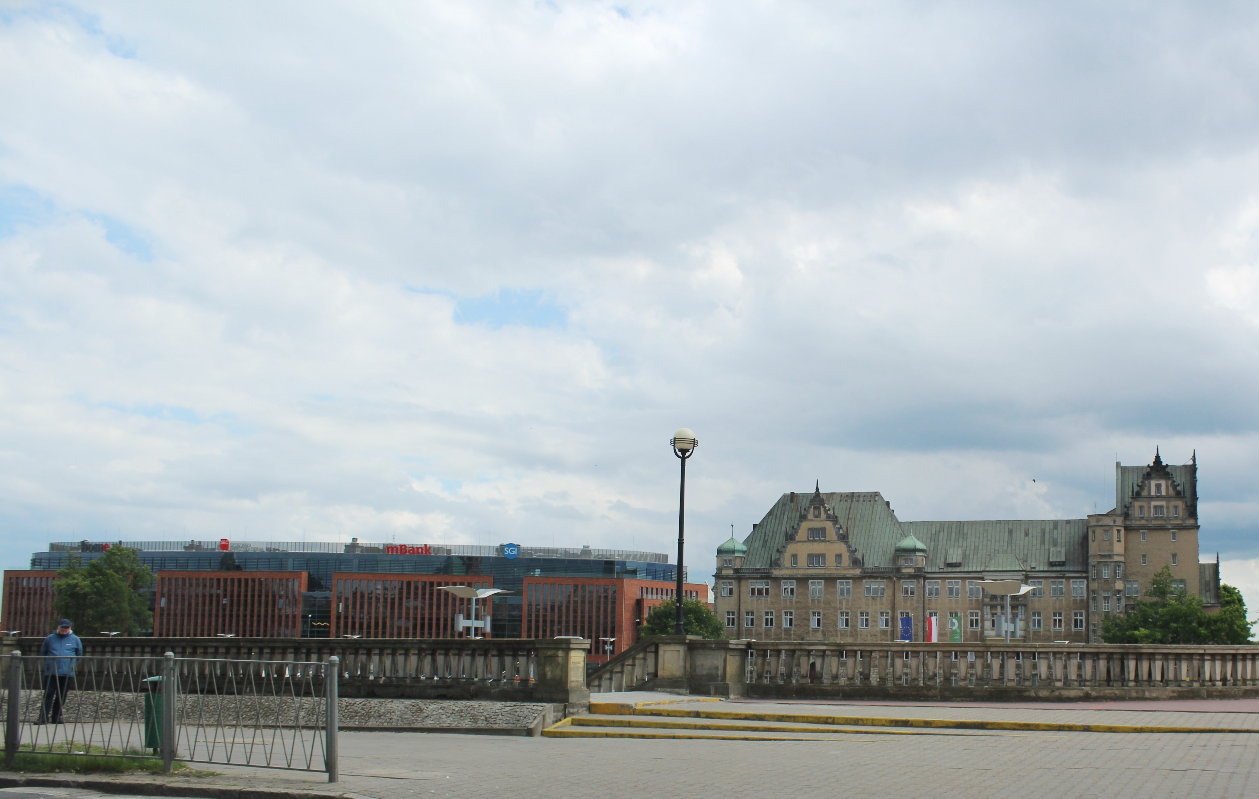 Lastadia Office i Urząd Celny w Szczecinie